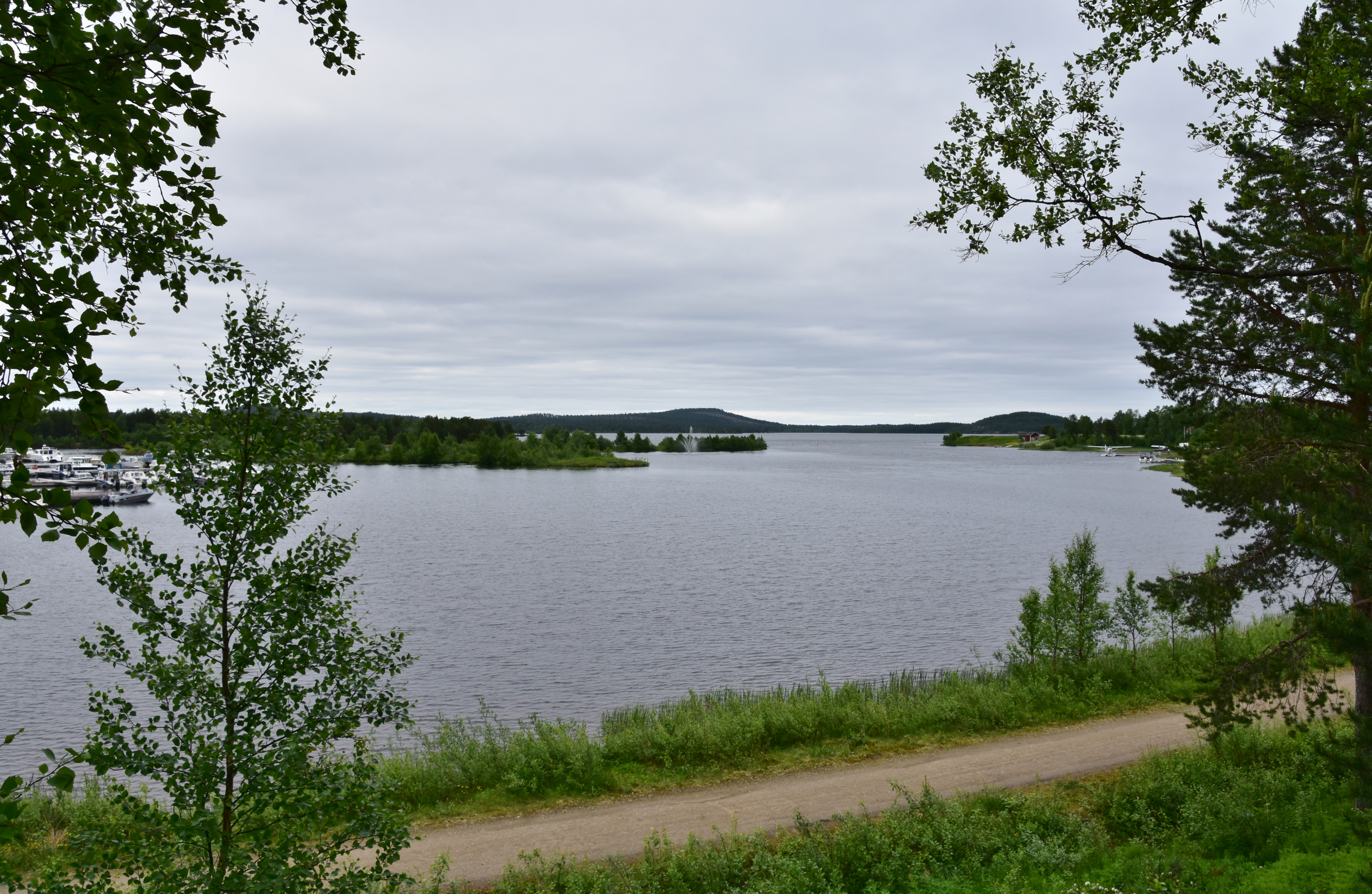 Inarijarvi Lake, Finland (4)